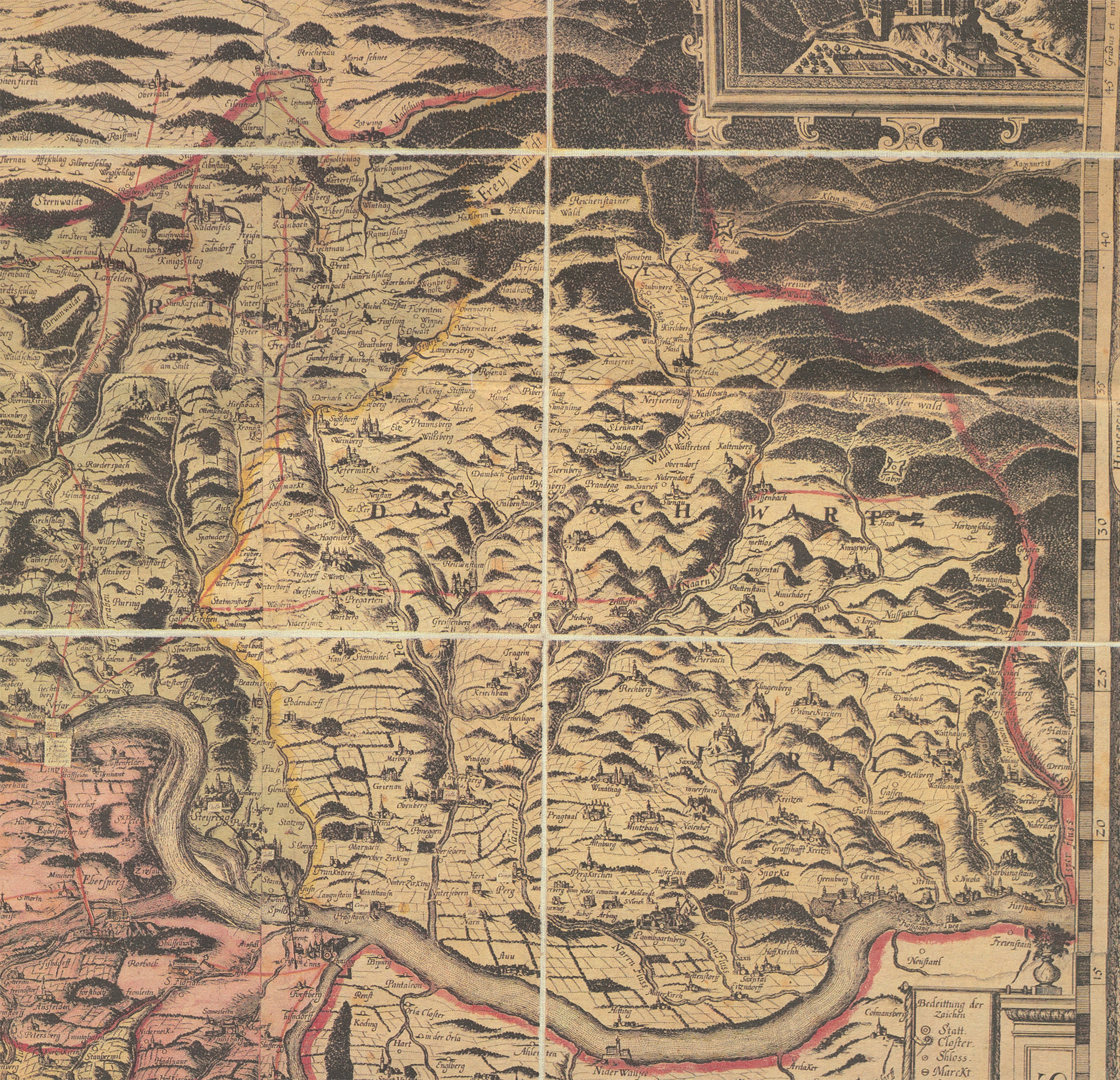 Das Schwartzviertl (Machlandviertel). Ausschnitt aus der Karte Archiducatus Austriae Superioris Descriptio facta Anno 1667. (Kartograf Georg Matthäus Vischer)